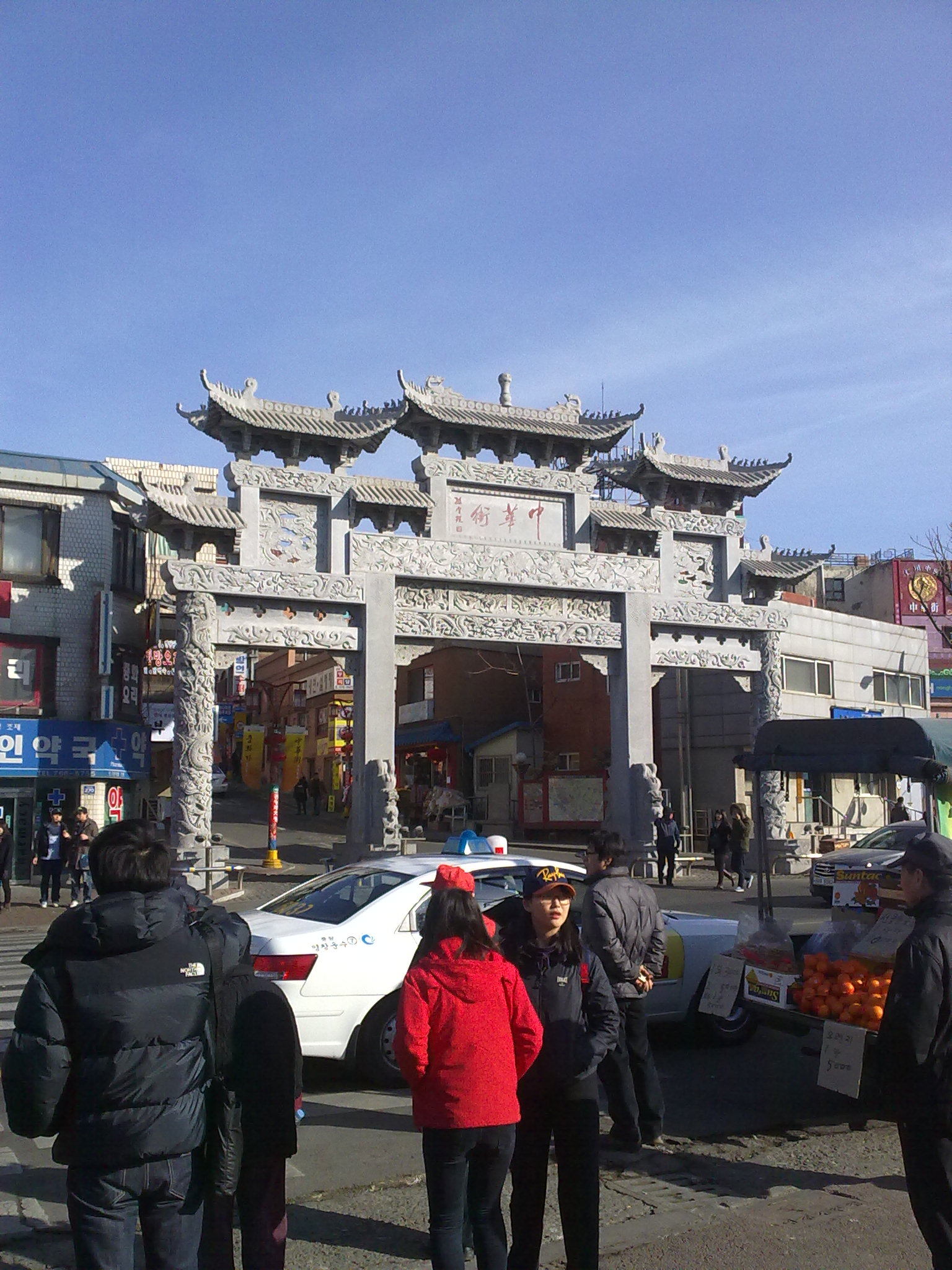 인천역 앞에 있는 인천 차이나타운의 입구